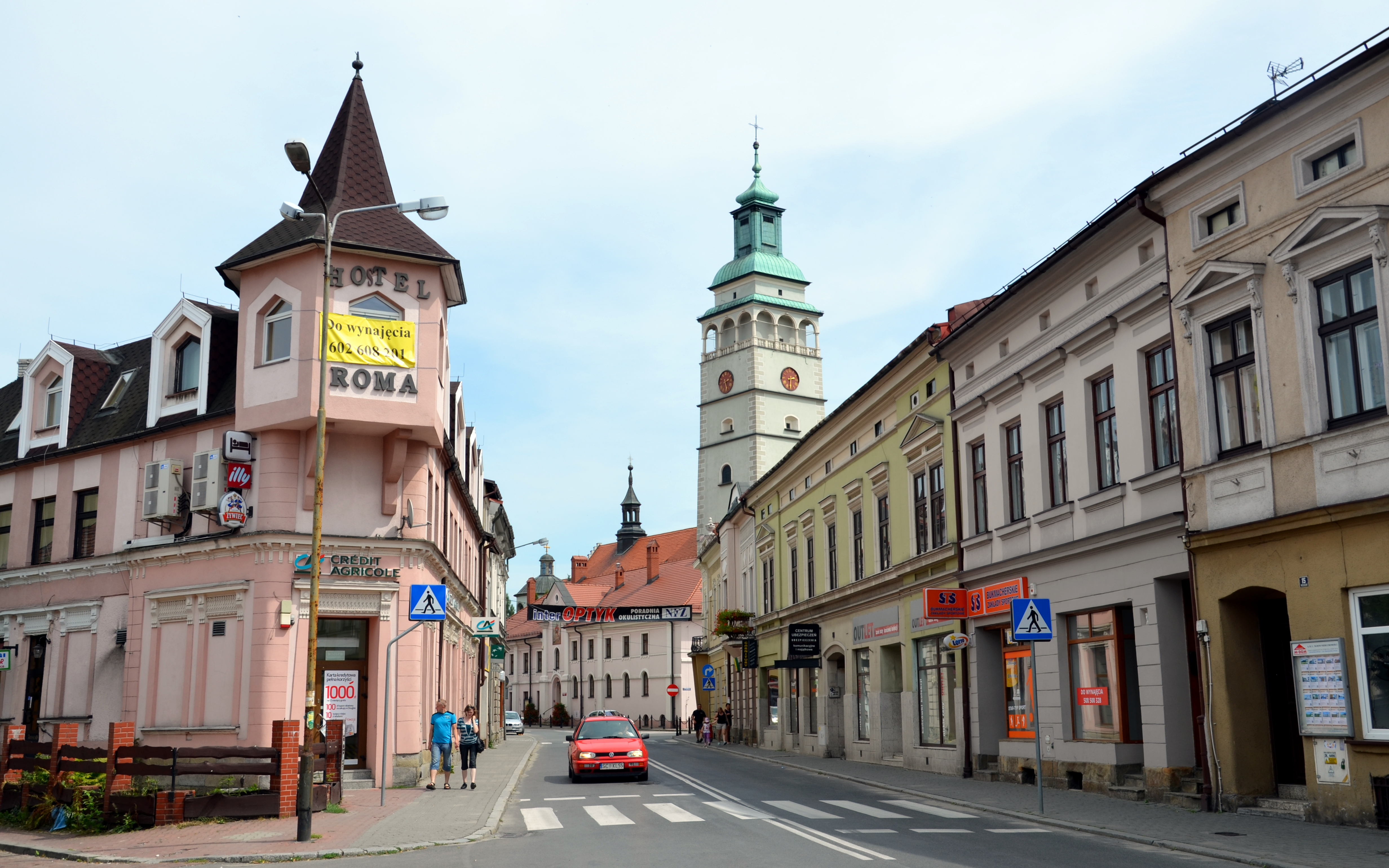 Die Kirche Mariä Geburt in Żywiec-Saybusch, Kosciuszki Straße